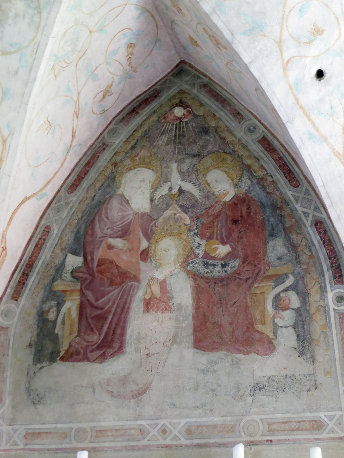 Chapelle du Saint-Esprit, Kasern, Prettau, Trentin-Haut-Adige, Italie